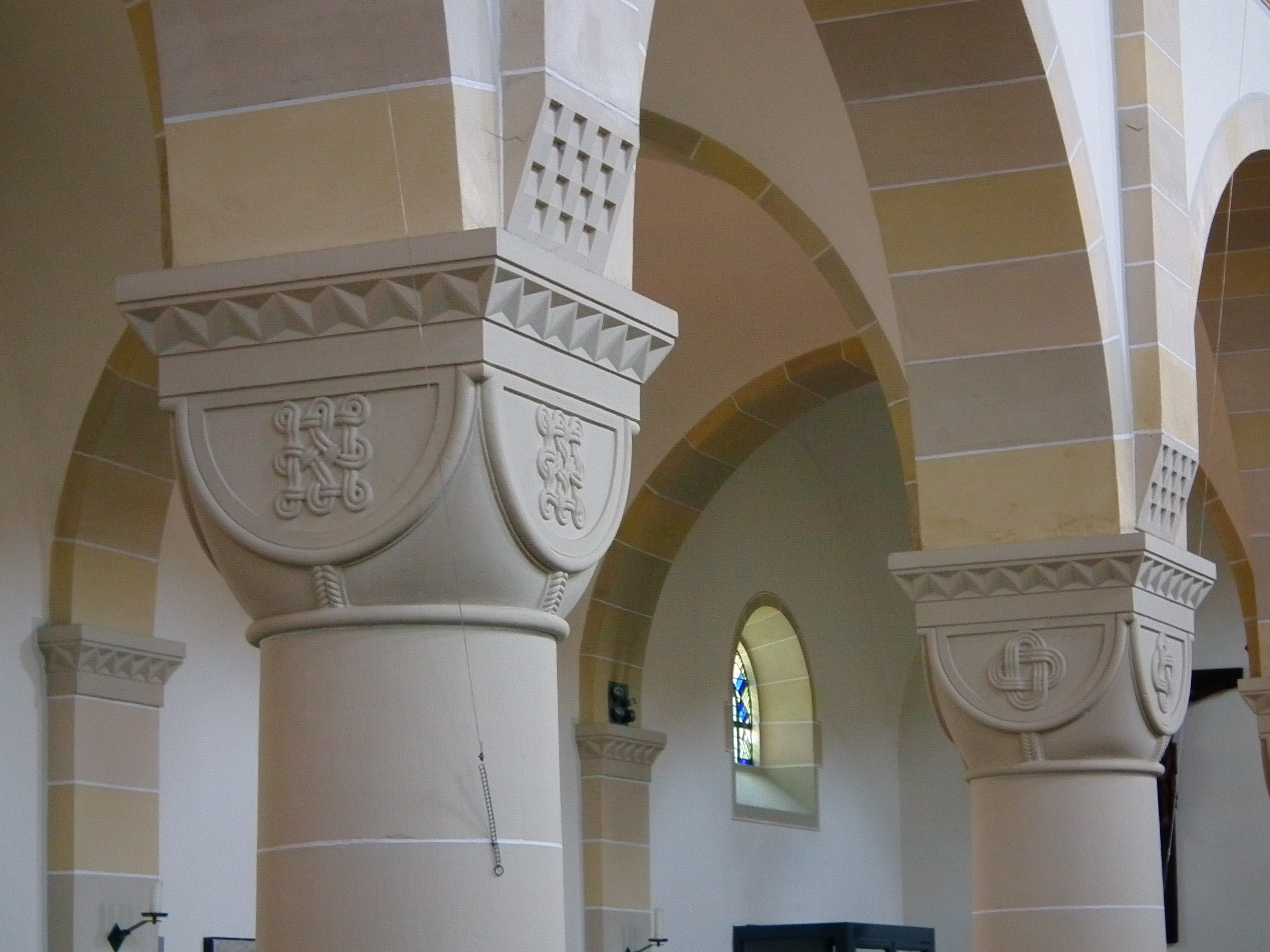 Katholische Kirche St. Peter im Heidelberger Stadtteil Kirchheim (Baden-Württemberg, Deutschland)